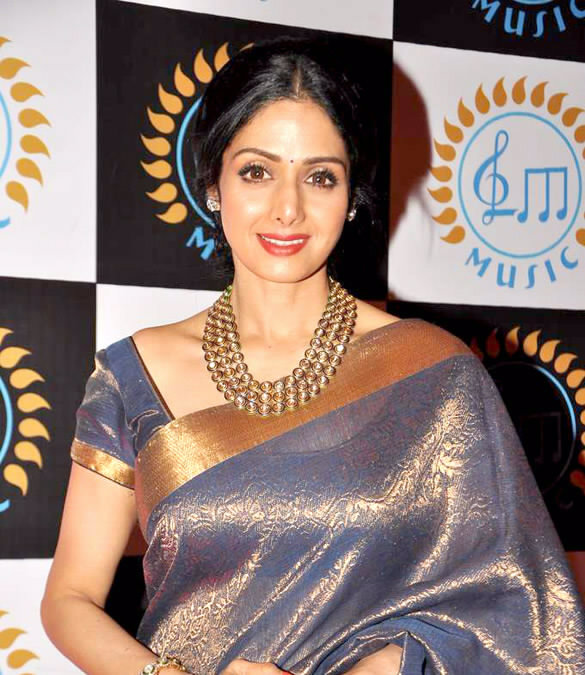 Sridevi at Lata Mangeshkar's music label launch